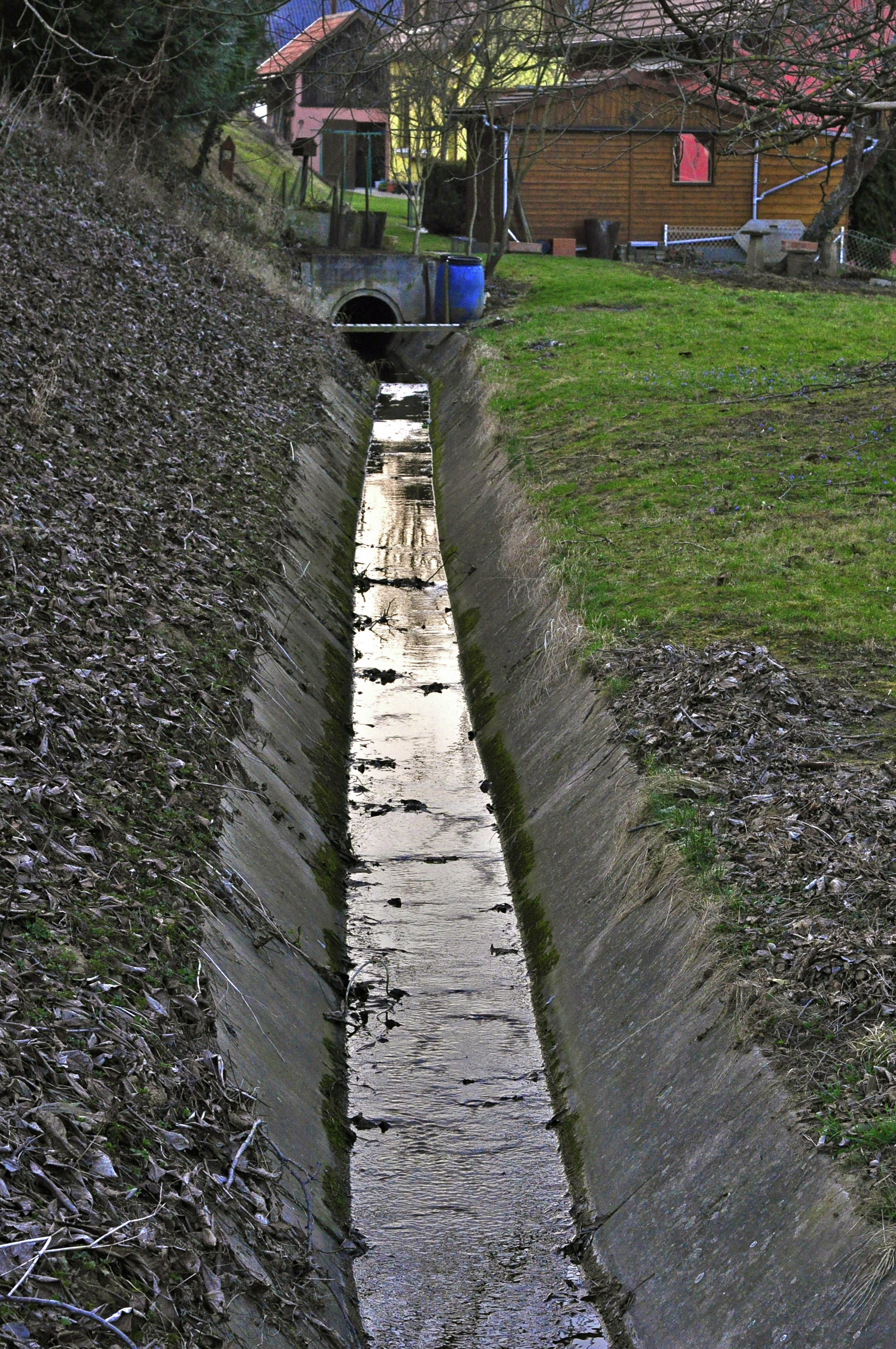 Ruisseau Rosenmeer canalisé près de Rosheim